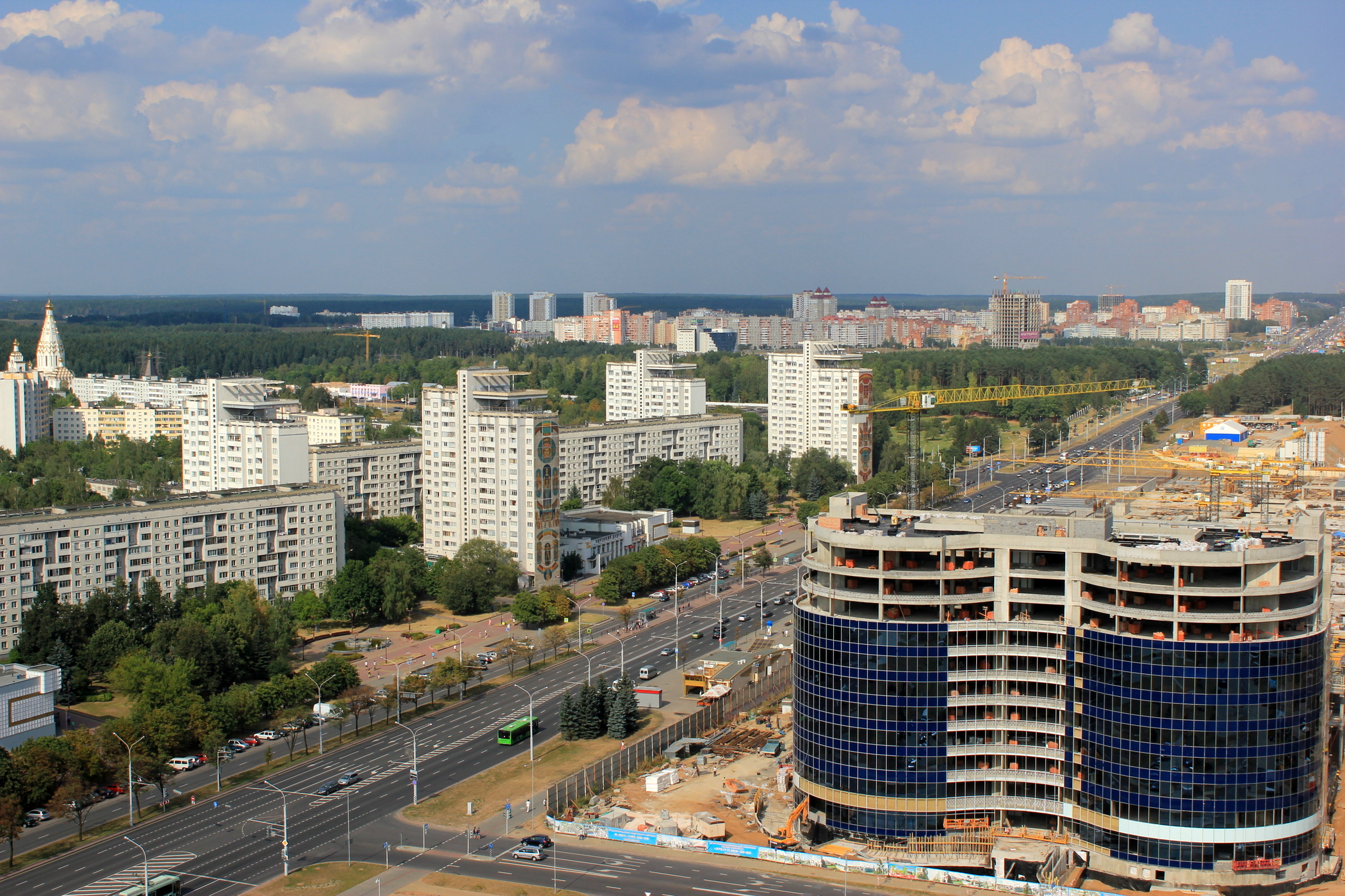 Minsk; Ausblick von der Nationalbibliothek nach Osten.